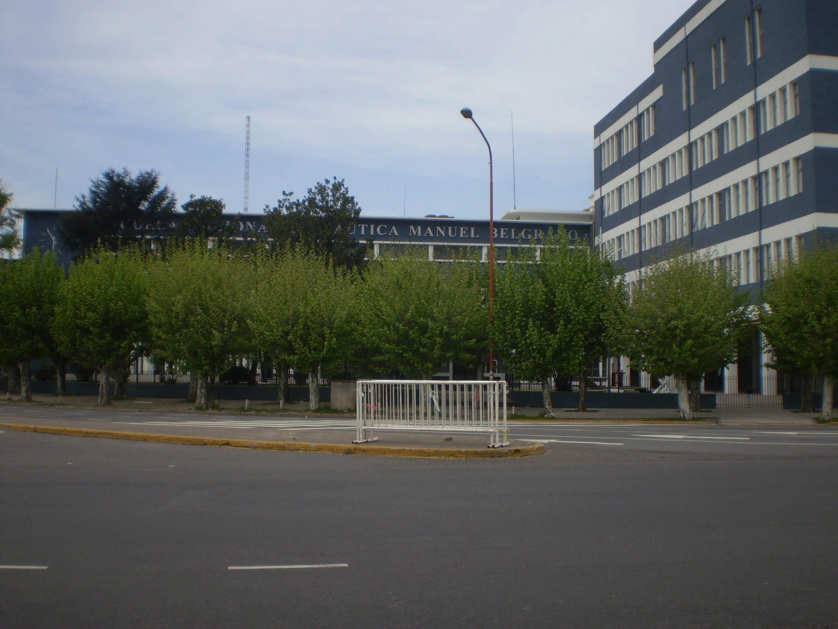 Fachada de la Escuela Nacional de Náutica "Manuel Belgrano" de Argentina, en el barrio de Retiro, Buenos Aires.